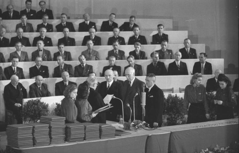 Staatsoper Berlin, Verleihung der Nationalpreise ADN-ZB/ Illus-Quaschinsky 7.10.50 Verleihung der Nationalpreise 1950. Am 7. 10. 50, dem Tag der Republik, wurden in der Staatsoper in Berlin die Nationalpreise 1950 an verdiente Künstler, Wissenschaftler, Techniker und Aktivisten verliehen. UBz: Verleihung des Nationalpreises 1. Klasse an das Kollektiv der VEB Optik Dr. Dipl. Ing. Hugo Schrade, Dr. Hans Boegehold und Dr. August Klemm. Abgebildete Personen: Schrade, Hugo Prof. Dr. Ing.: Generaldirektor des VEB Carl Zeiss Jena, DDR (GND 12881215X) Klemm, August Dr.: Physiker im VEB Carl Zeiss Jena, Nationalpreis 1950, DDR (GND 117523712)